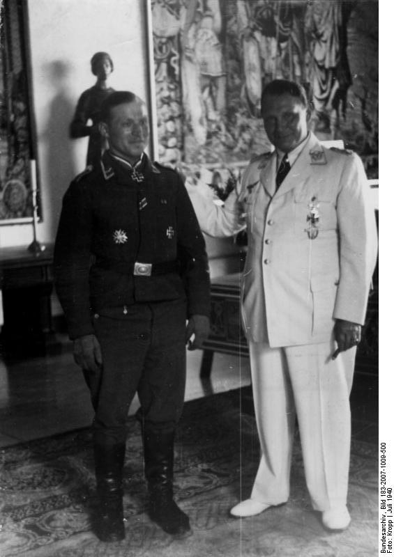 Herbert Nelke und Hermann Göring Generalfeldmarschall und Unteroffizier Generalfeldmarschall Hermann Göring empfing den Unteroffizier Nelke, um ihm im Auftrag des Führers das Ritterkreuz des Eisernen Kreuzes zu überrreichen und gleichzeitig wegen Tapferkeit vor dem Feinde zum Oberwachtmeister zu befördern. Unteroffizier Nelke war bei Saumont mit seinem Geschütz zur Abwehr feindlicher Panzerangriffe als nächtliche Sicherung vor die eigene Infanterie vorgeschoben worden. Mitten in der Nacht tauchte plötzlich im Rücken des Geschützes eine größere Marschkolonne von Engländern und Franzosen auf. Nach kurzem Handgemenge gelang es ihm und seiner Geschützbedienung durch schneidigen Angriff 97 Franzosen und 20 Engländer unter Führung eines französischen Hauptmannes gefangenzunehmen. Scherl Bilderdienst (Kropp), Bln. KG 12.7.1940 [Herausgabedatum]